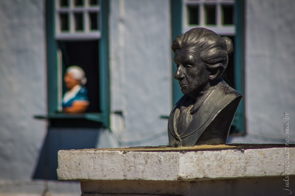 Bustos da poetisa Cora Coralina em frente ao Museu Casa de Cora - Cidade de Goiás.